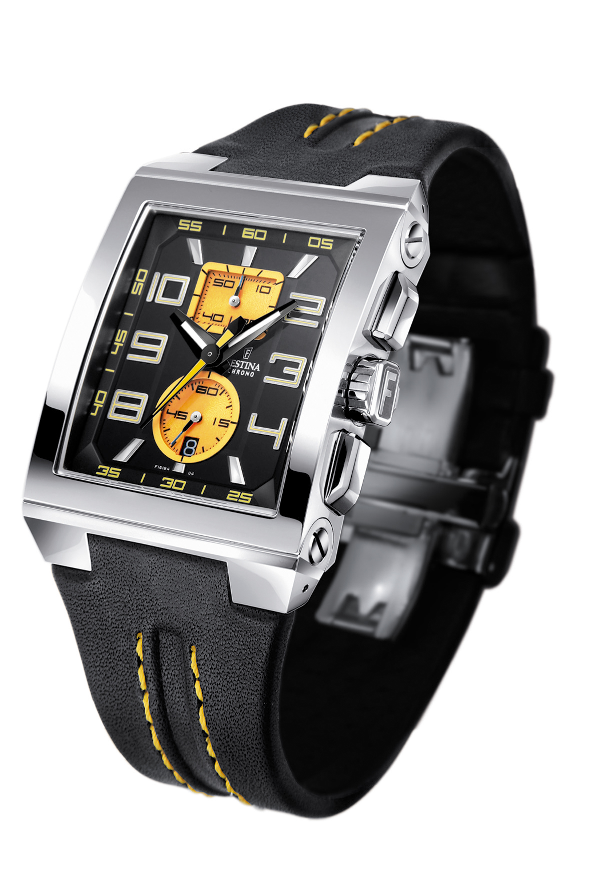 Eine Uhr von Festina